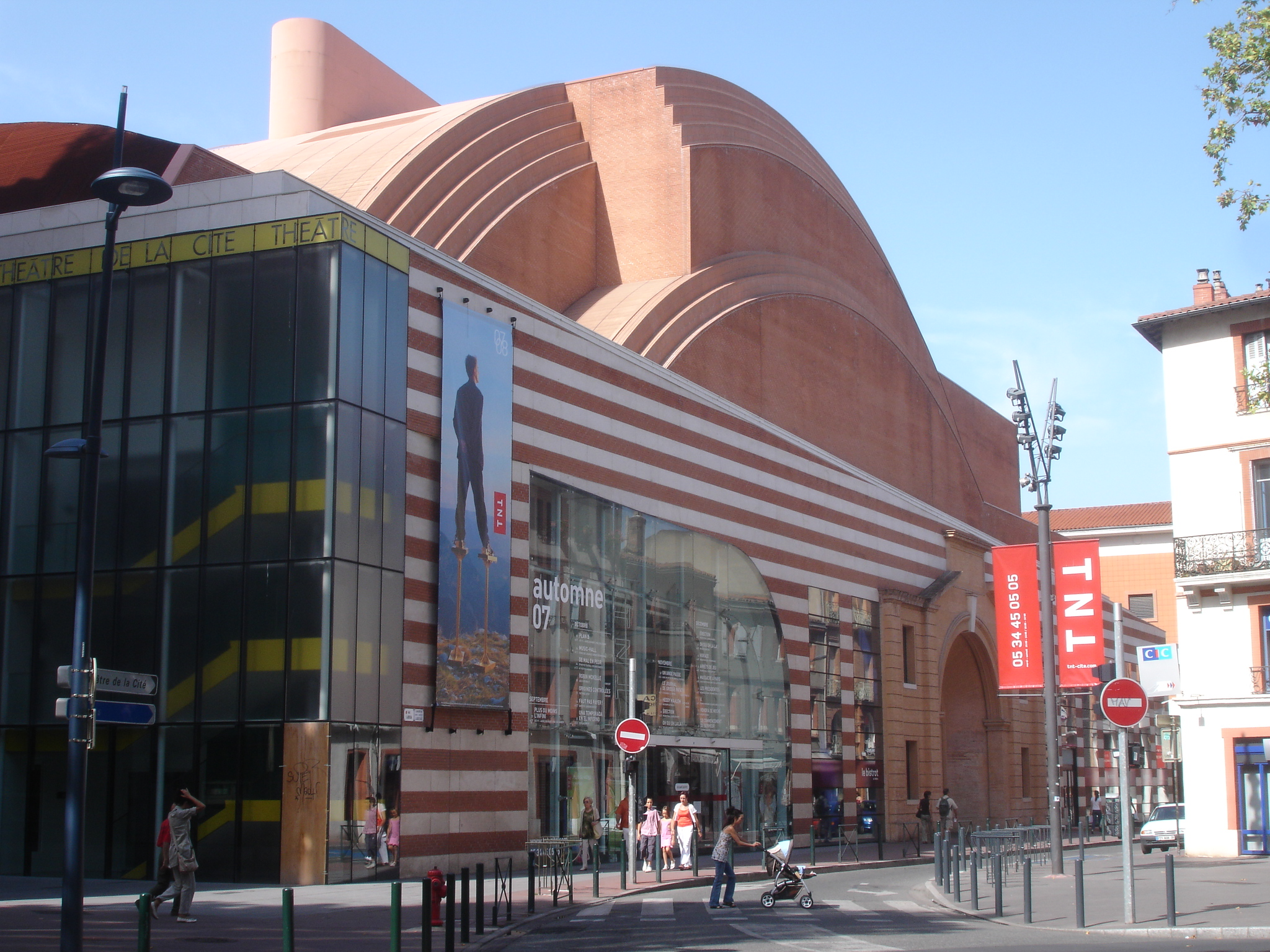 France, Haute-Garonne (31), Toulouse, théâtre national de Toulouse.